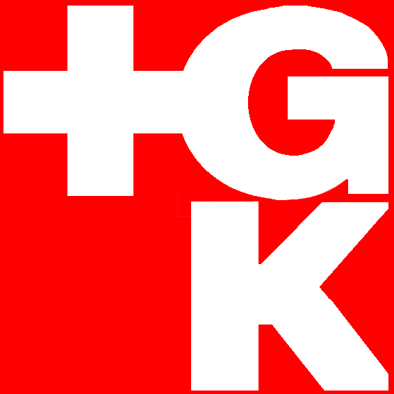 Logo der Schweizerischen Gesellschaft für Kartografie SGK